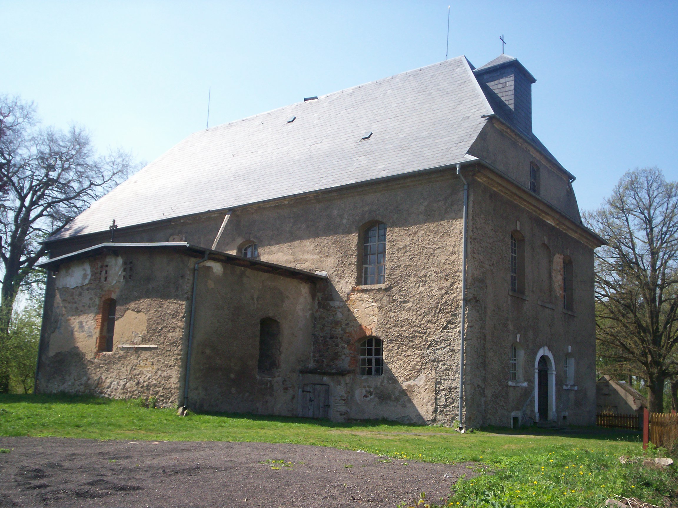 Bystrzyca, kościół pw. MB z Lourdes.